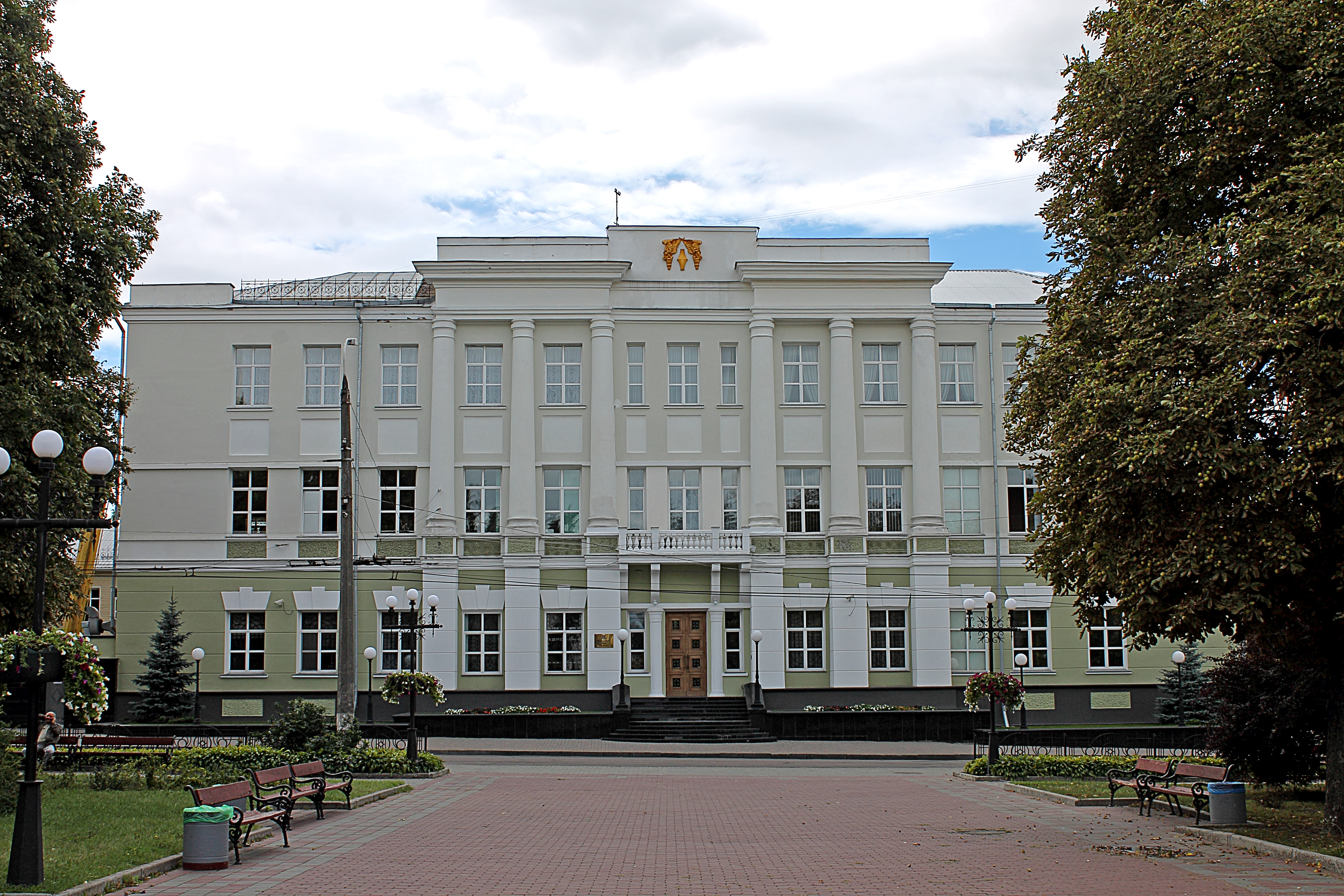 Будинок міського банку, Чернігів, вул. Кирпоноса, 18